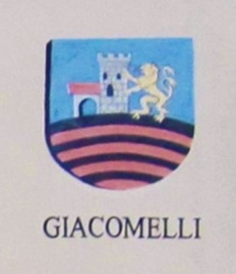 Cognomi storici dei Vicini che discendono dalle famiglie della Regola che abitavano a Predazzo e riguardano 19 cognomi: Boninsegna, Bonora, Bosin, Brigadoi, Defrancesco, Degaudenz, Dellagiacoma, Dellantonio, Dellasega, Demartin, Dezulian, Felicetti, Gabrielli, Giacomelli, Guadagnini, Morandini, Nicolao, Piazzi e Zanna.